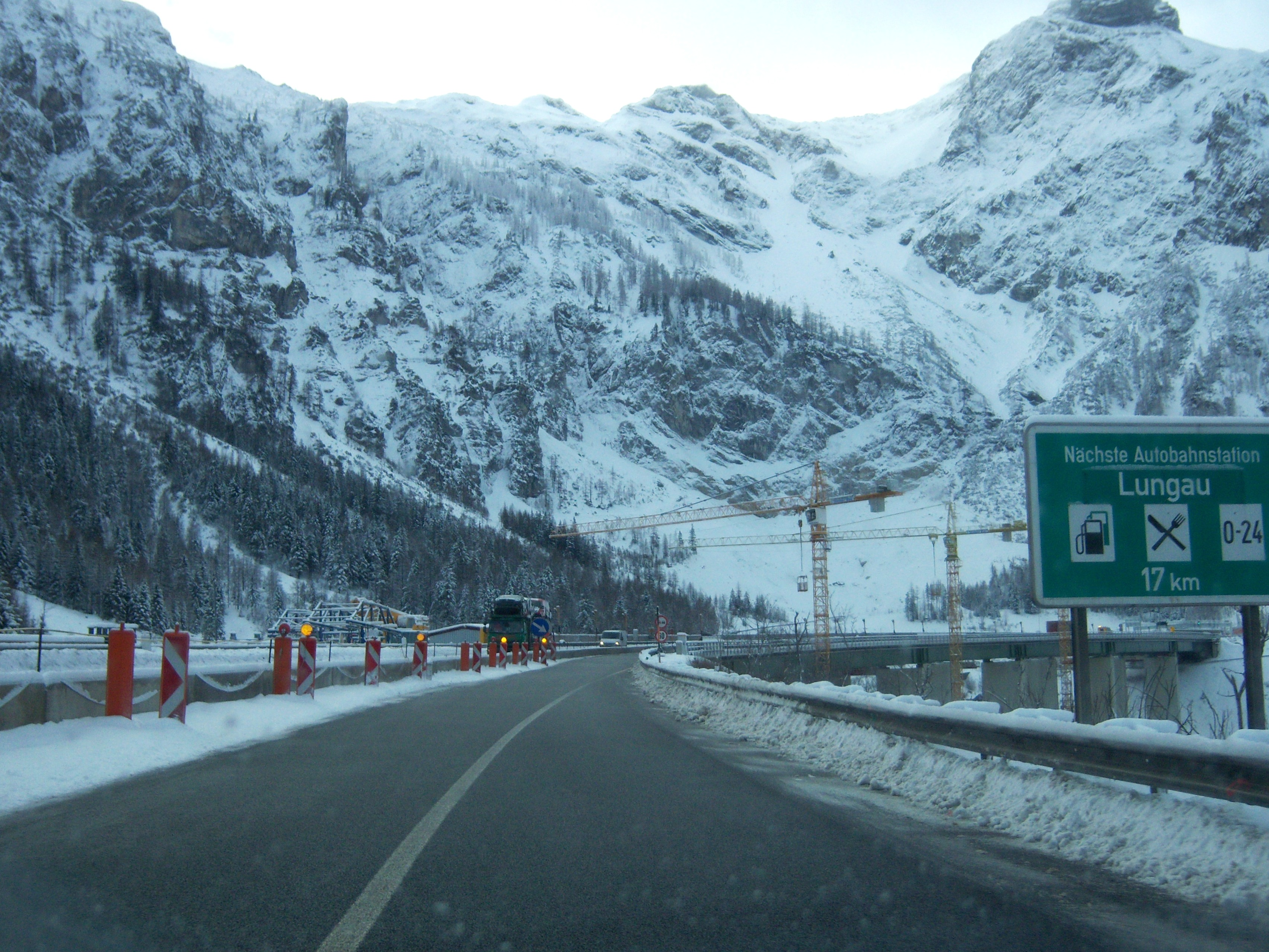 Tauern Autobahn A10 Richtung Villach unweit dem Nordportal des Tauerntunnel